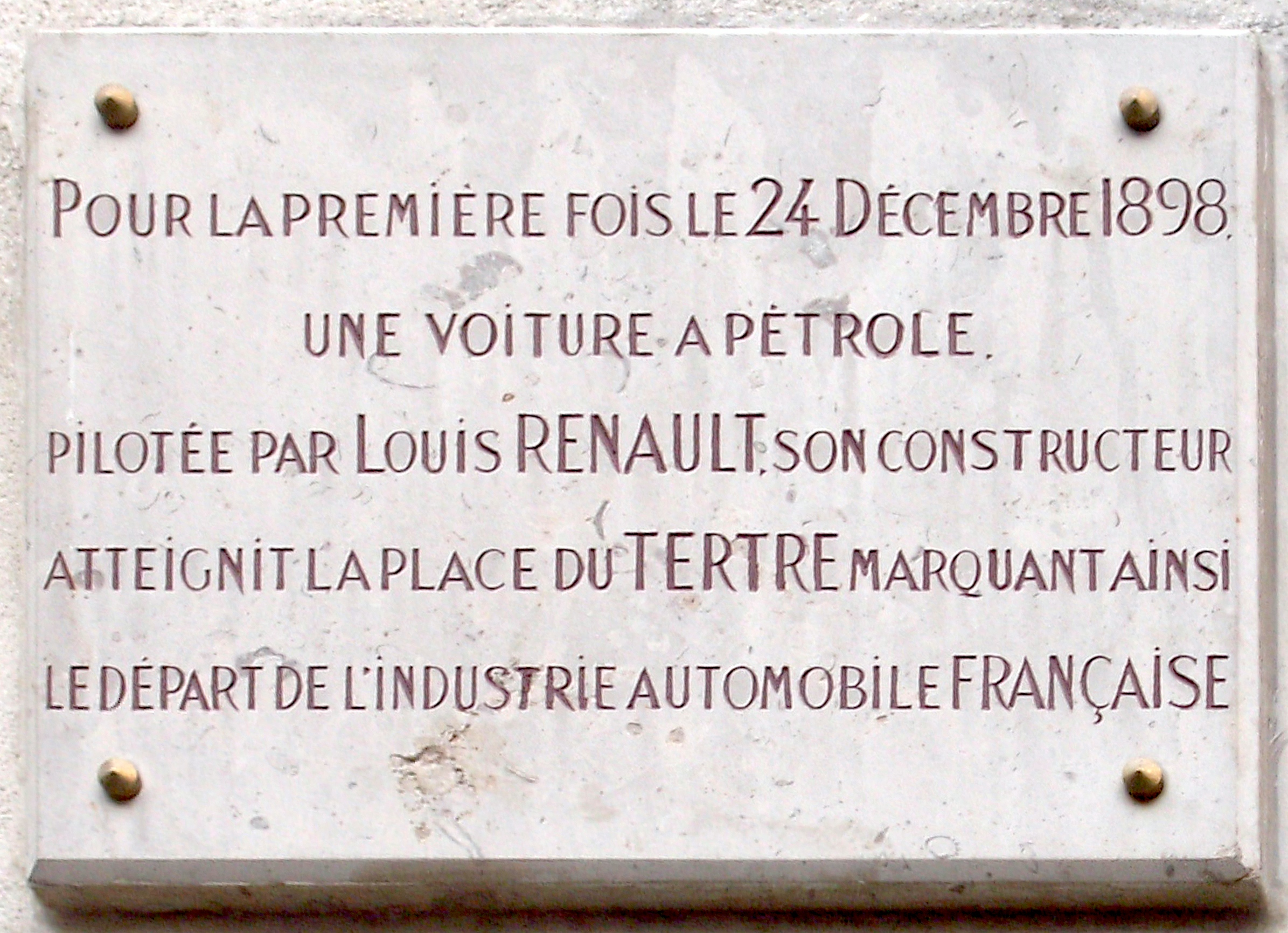 Paris - Montmartre - Place du Tertre